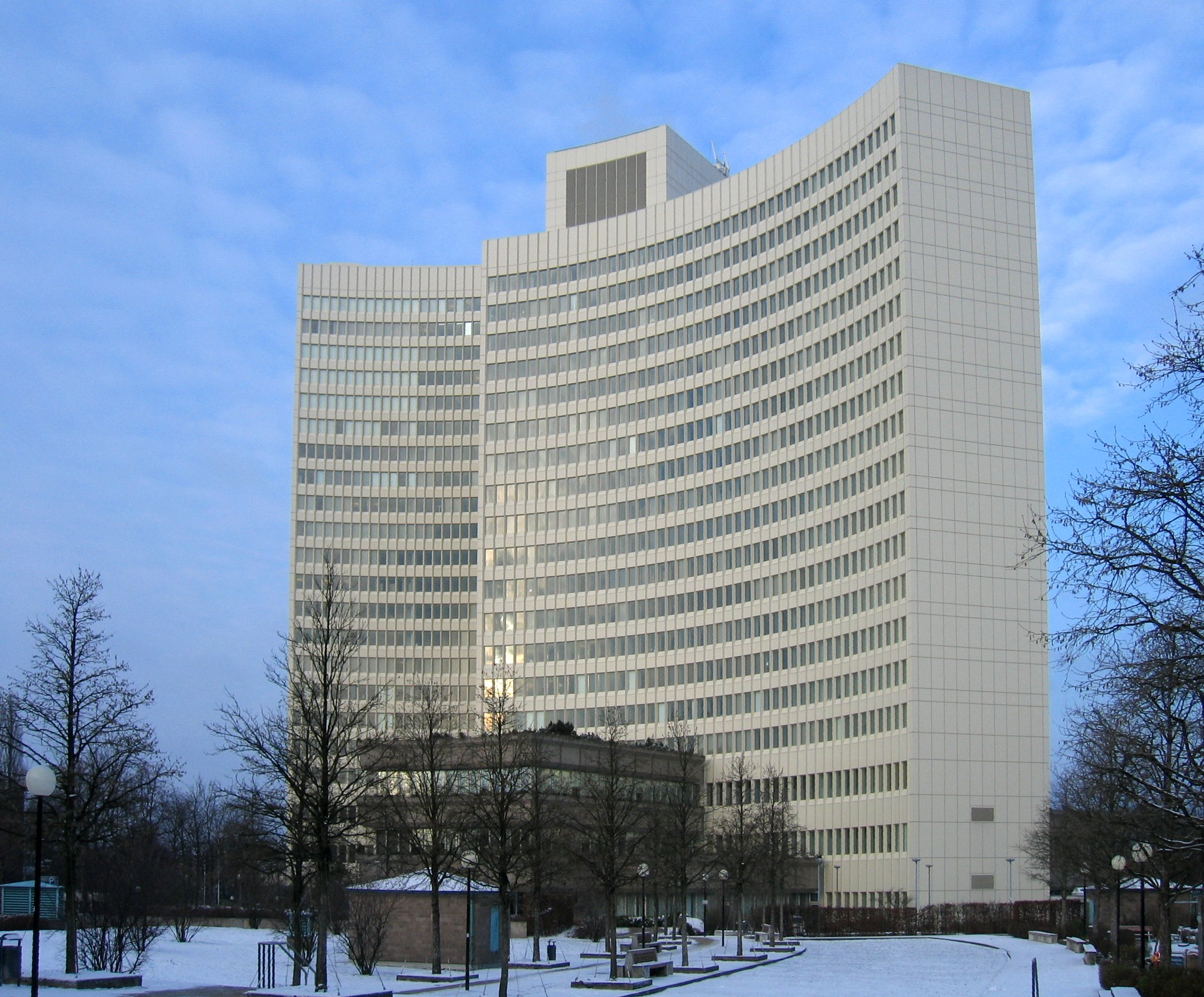 Hermes Gebaeude Hamburg - Perspektivkoorektur